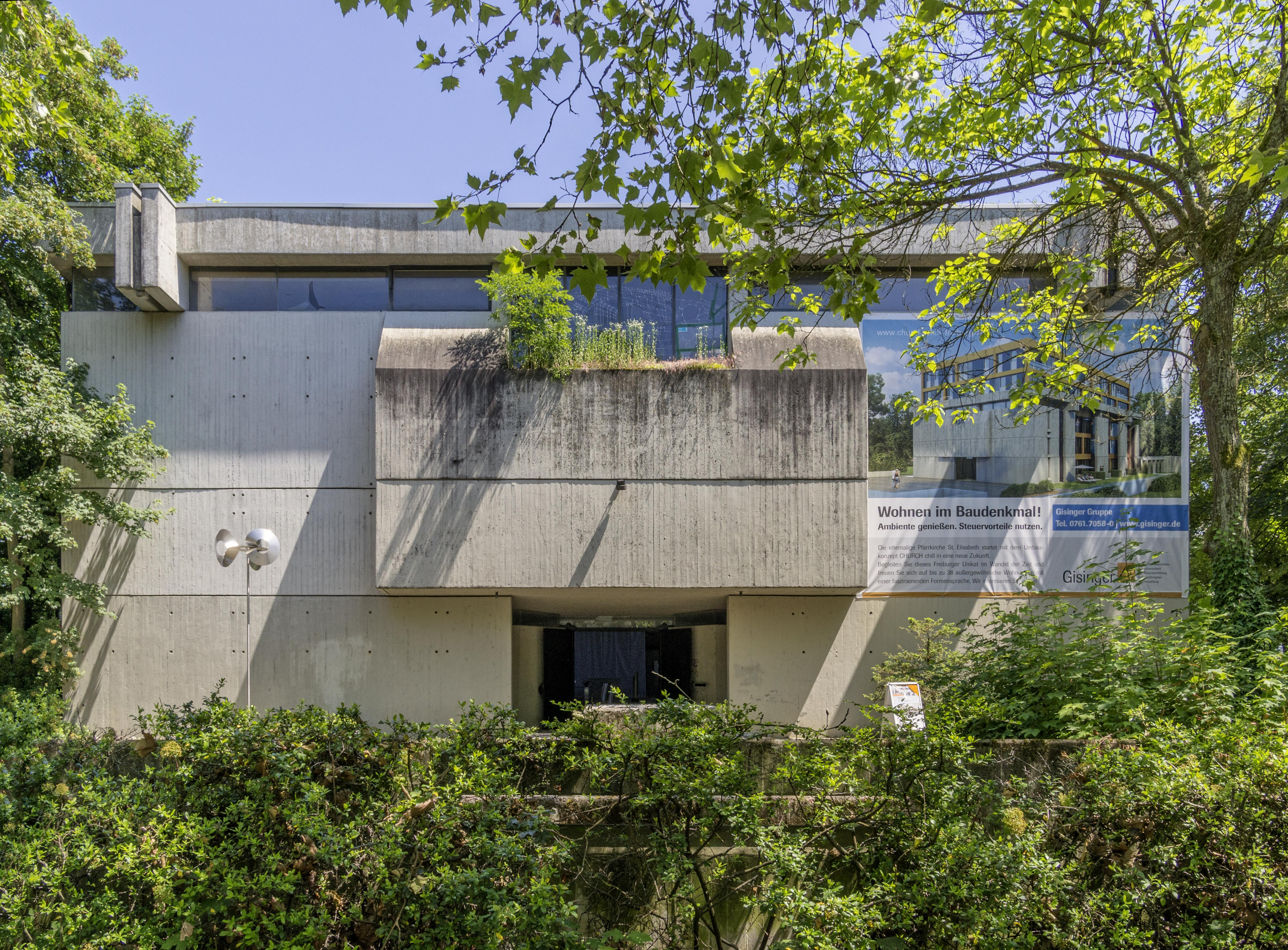 Bilder der profanisierten St. Elisabethkirche, die jetzt zum Wohngebäude umgebaut wird.